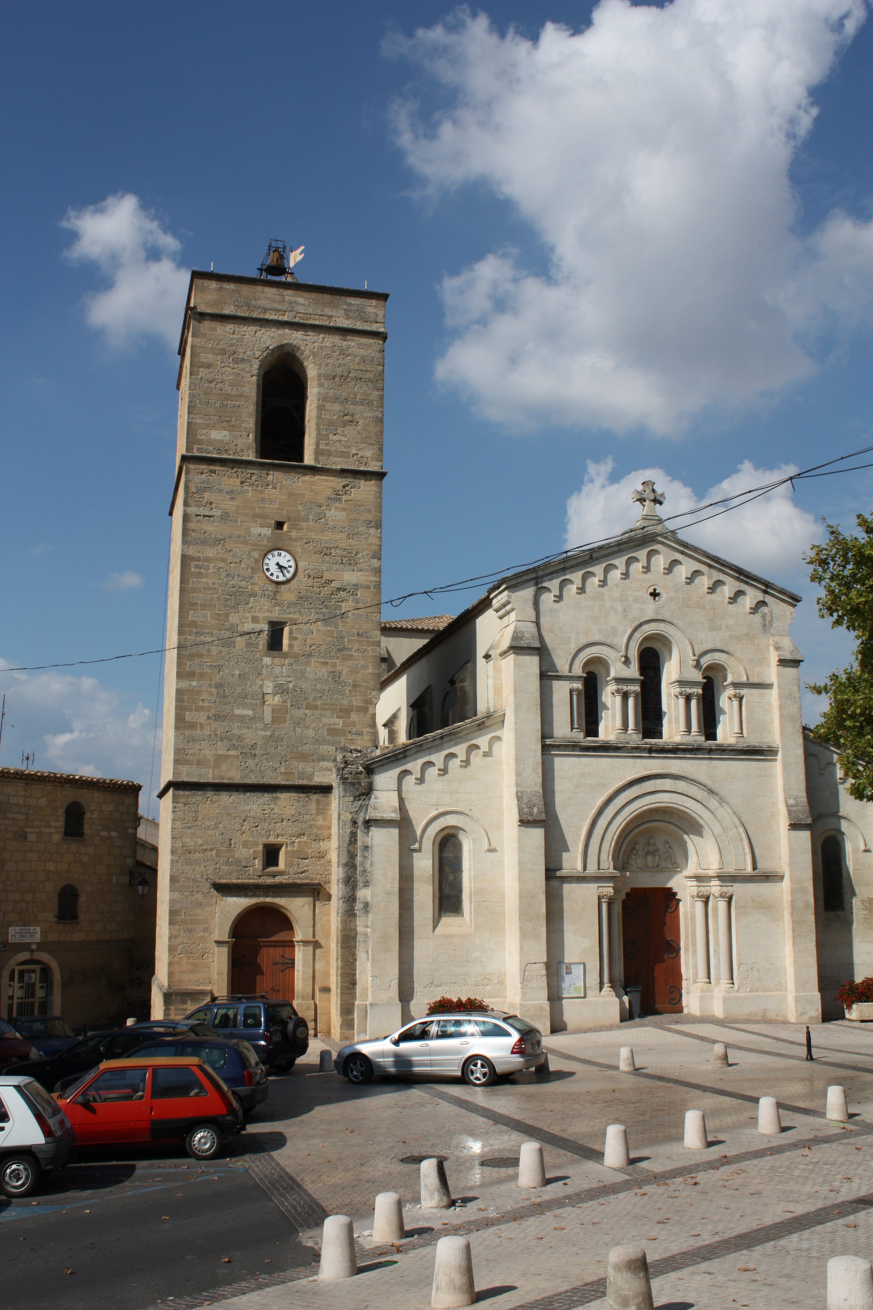 Clocher de l'église Saint-Jacques de Fabrègues (Hérault) - Vu de devant .